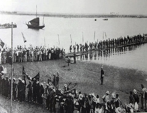 Quân dân miền nam tập kết tại Cảng Hới.